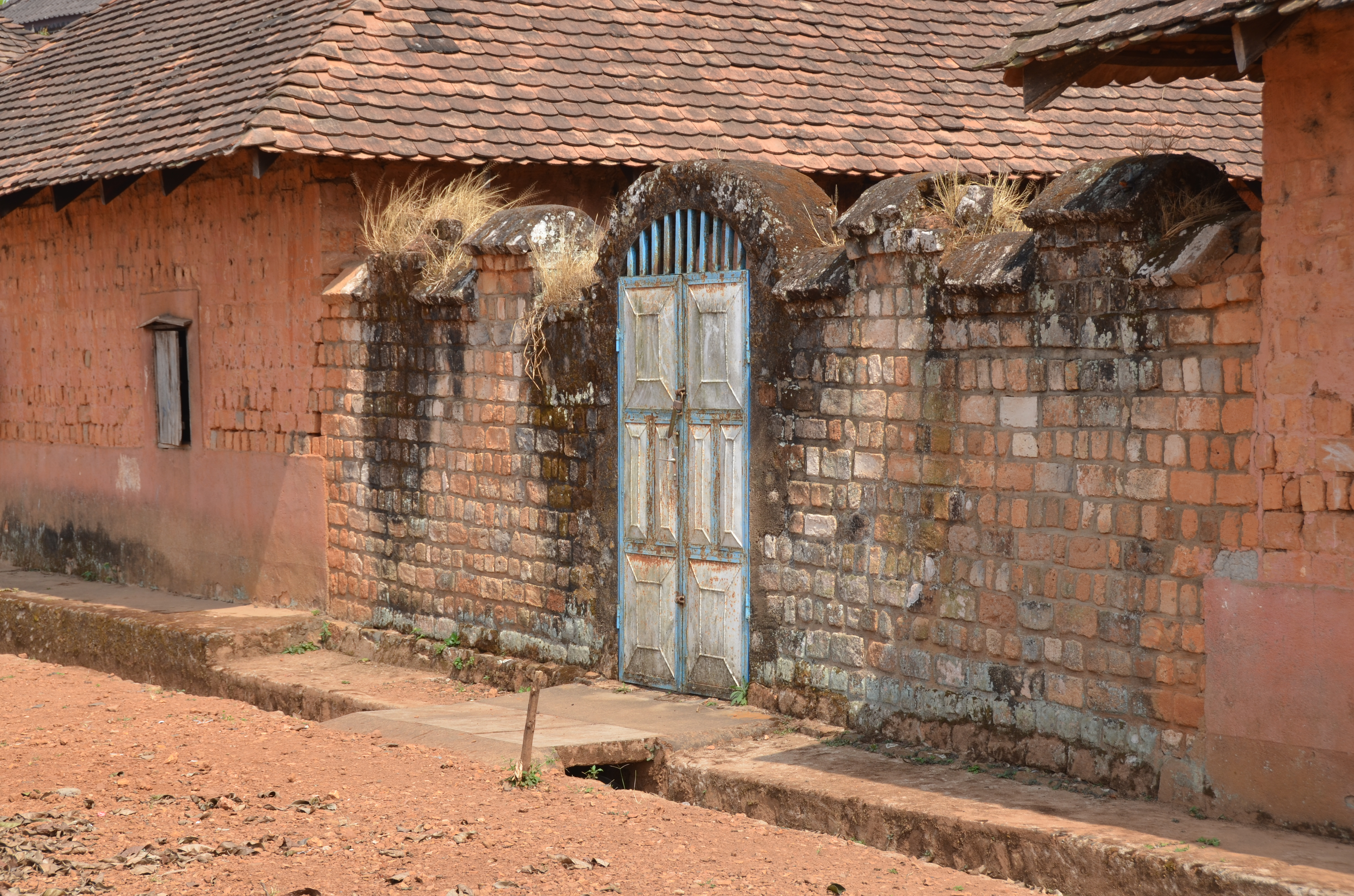 Porte de la chefferie Bafut